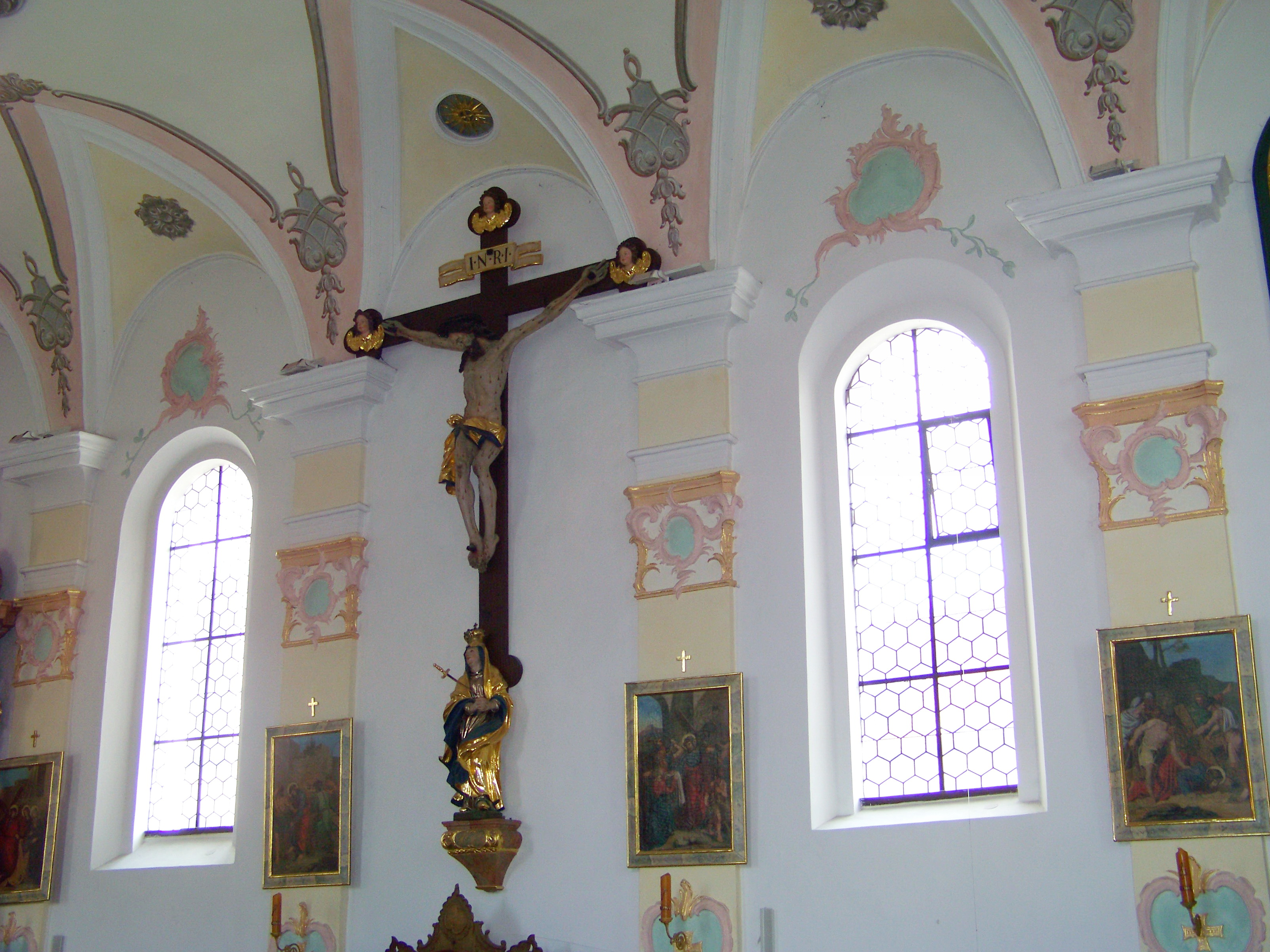 Langquaid Marktplatz 14. Katholische Pfarrkirche St. Jakob d. Ä. Saalkirche mit Steildach, eingezogenem Rechteckchor und Chorscheitelturm, Portalvorhalle nach Süden, Chor und Turm im Kern romanisch, 13. Jahrhundert, Langhaus spätgotisch, 15. Jahrhundert, Barockisierung der Anlage um 1740, Verlängerung nach Westen, 1917; mit Ausstattung. An der Südwand des Langhauses großes Kruzifix um 1700.